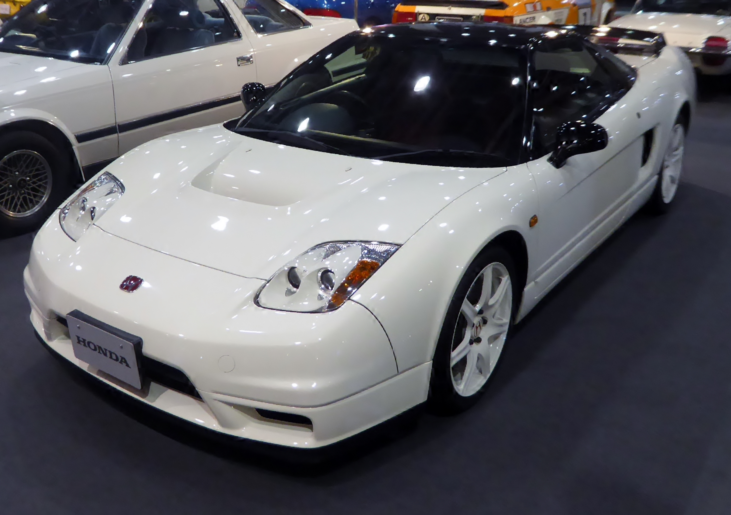 大阪オートメッセ2017に於いて2002年型ホンダ・NSX-Rを撮影。